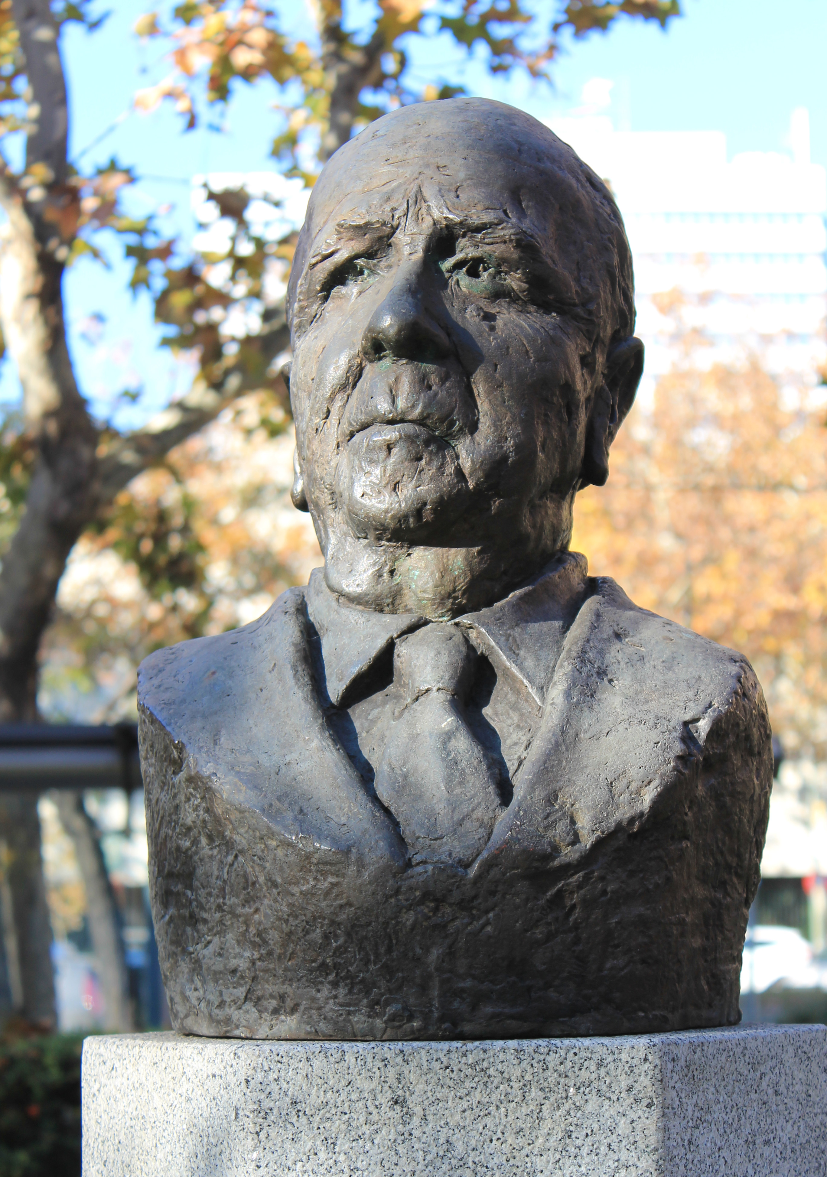 Depicted person: Pedro Escartín.